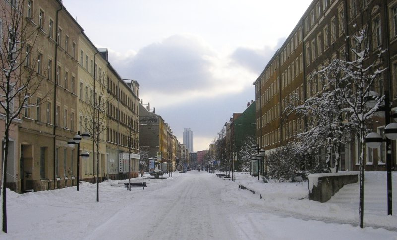 Der „Brühl“ in Blickrichtung zur Chemnitzer Innenstadt